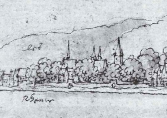 Darstellung der Propstei Hirzenach auf einer Zeichnung von Wenzel Hollar